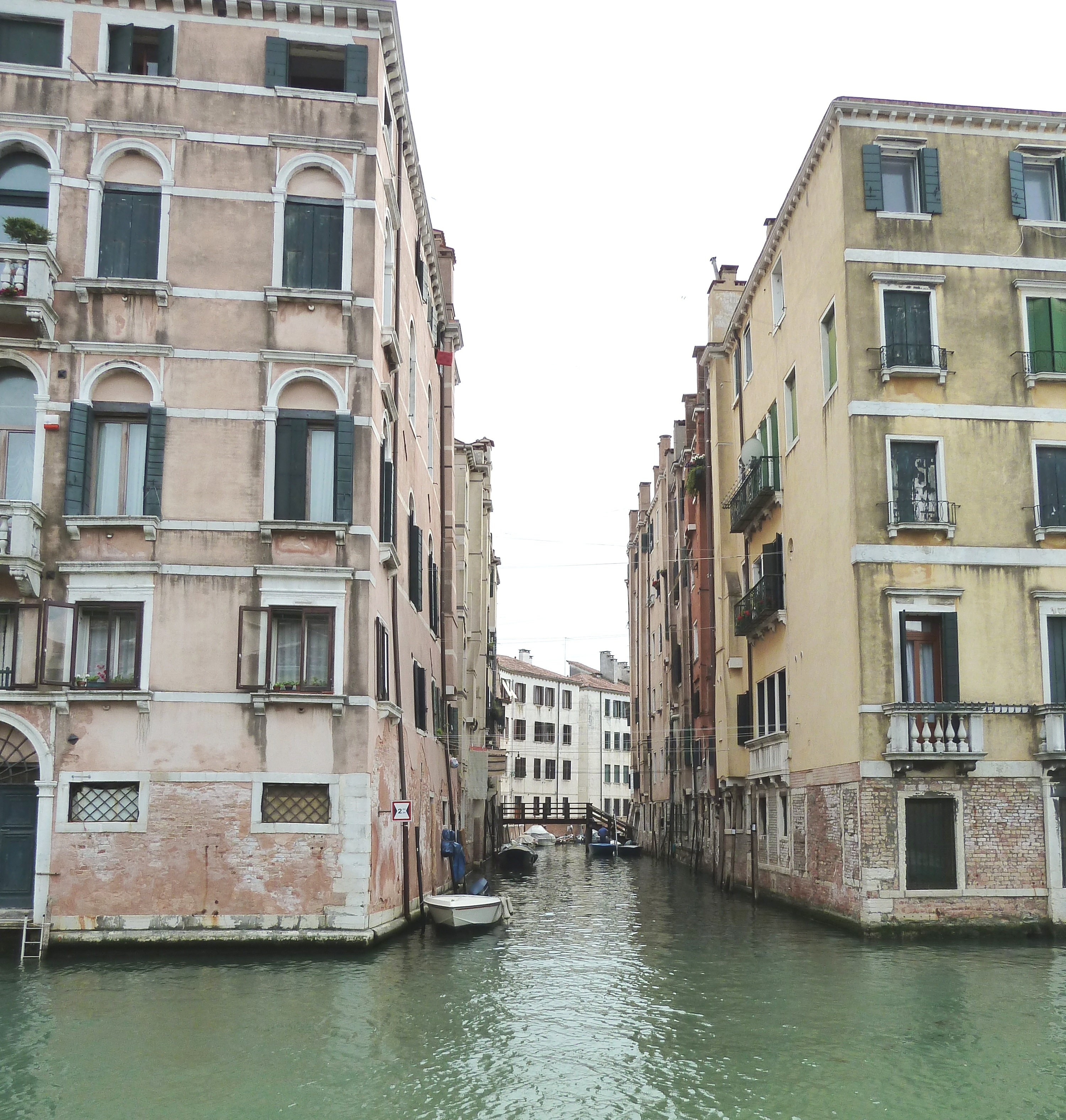 Rio del Gheto (Venice)